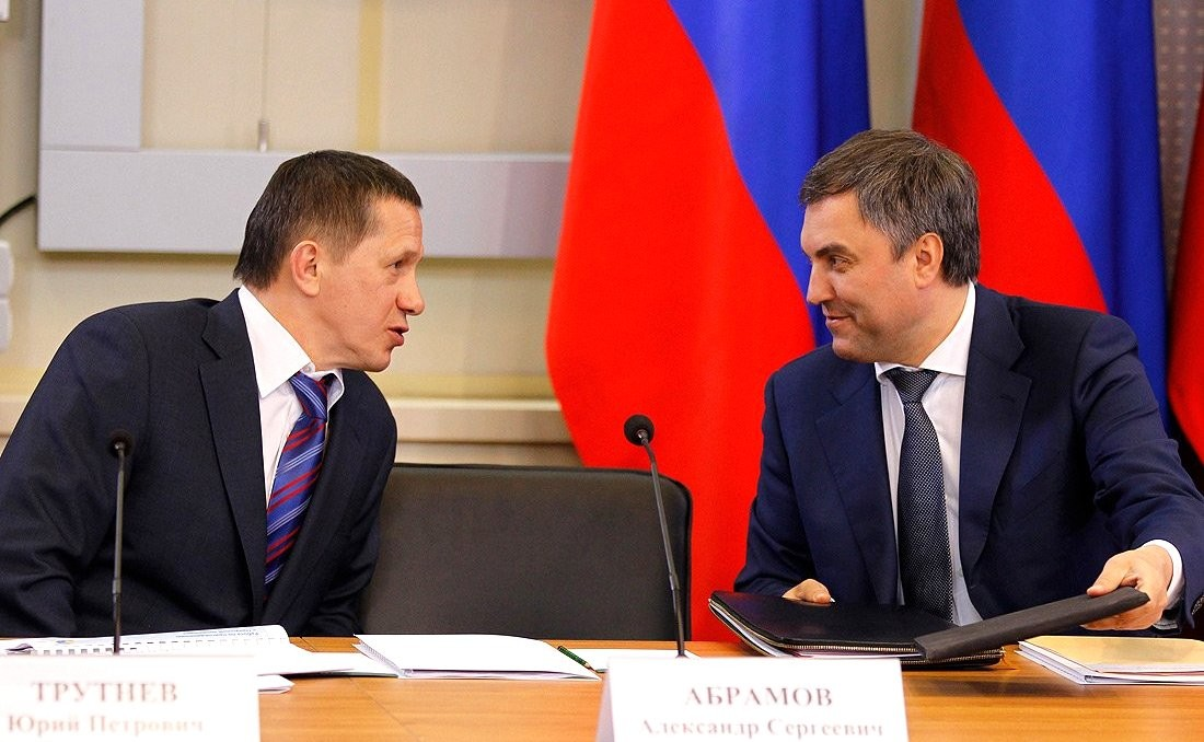 Перед началом заседания Совета по развитию гражданского общества и правам человека. Министр природных ресурсов и экологии Юрий Трутнев (слева) и Первый заместитель Руководителя Администрации Президента Вячеслав Володин